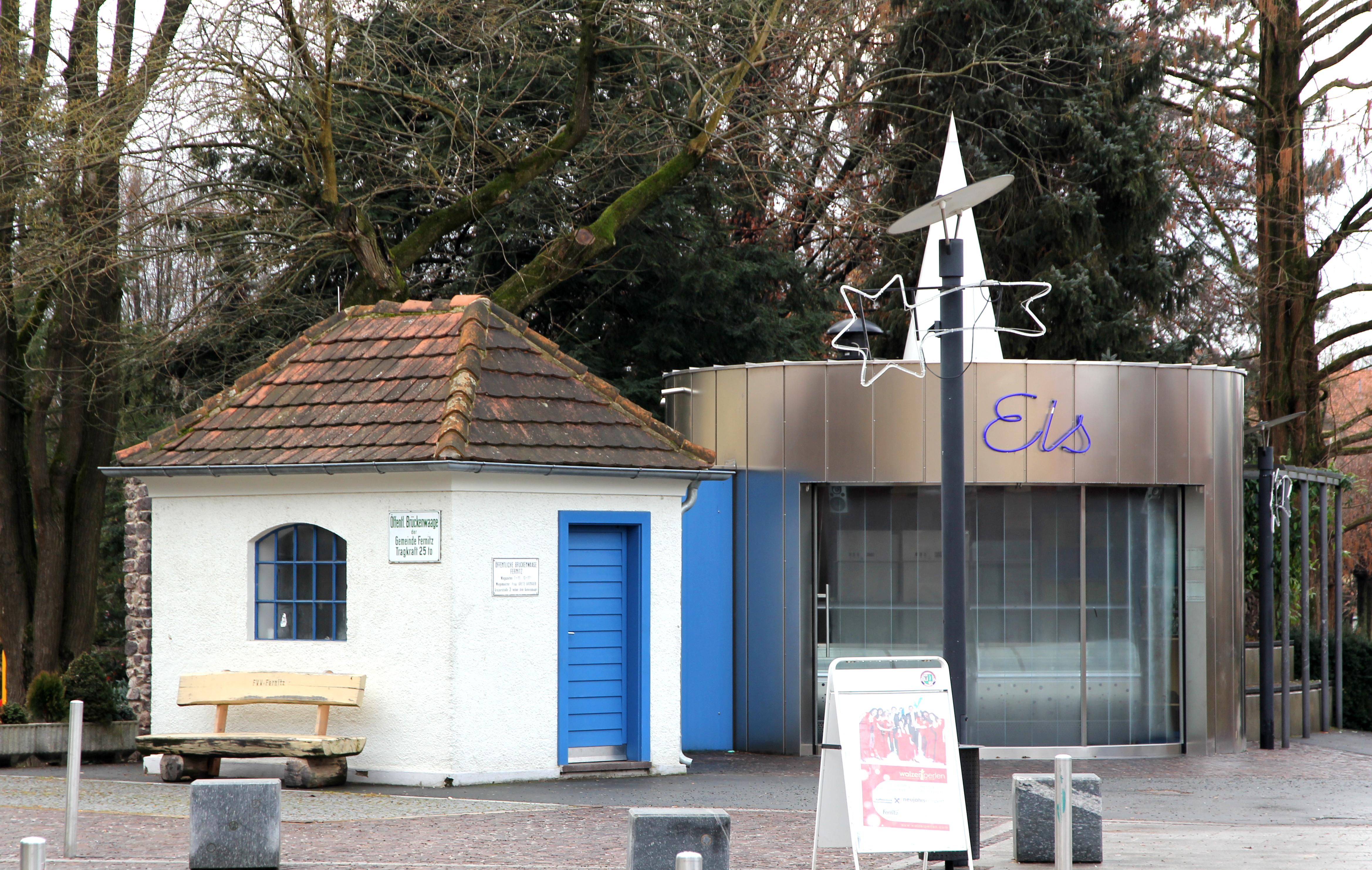 Brückenwaage